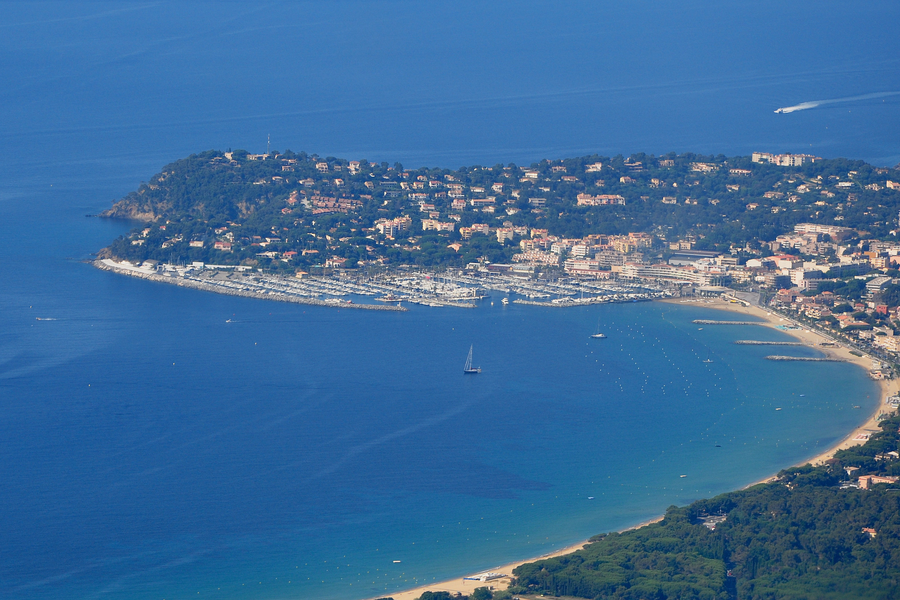 Vue aérienne de la baie de Cavalaire